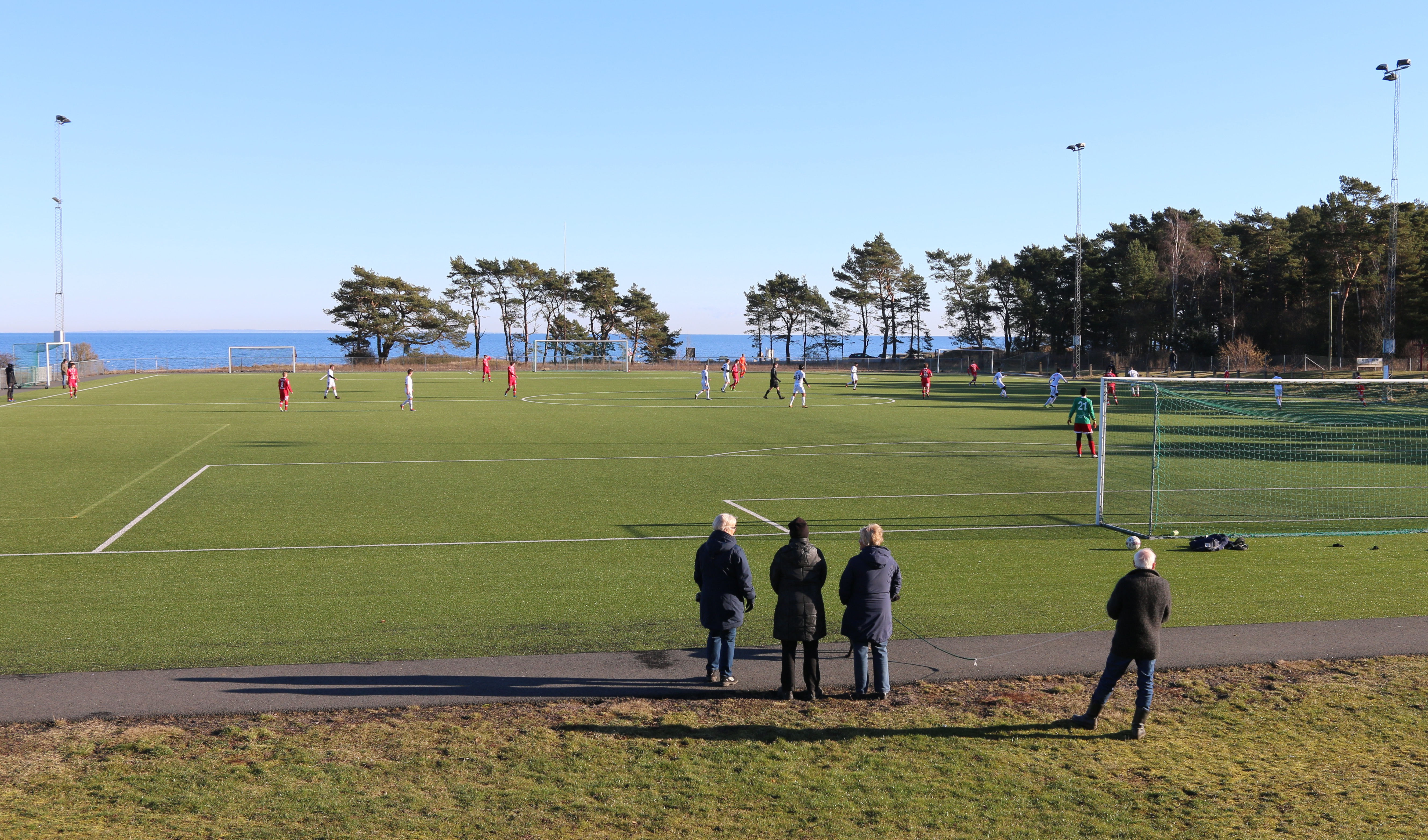 Skillinge IP Träningsmatch Österlen FF - IS Halmia